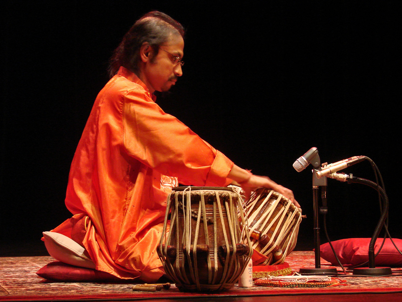 Nabankur Bhattacharya en concert à l'Auditorium du musée Guimet Vendredi 16 janvier 2009 Duo Sudheshna et Nabankur Bhattacharya Sarod et tabla (Inde du nord)